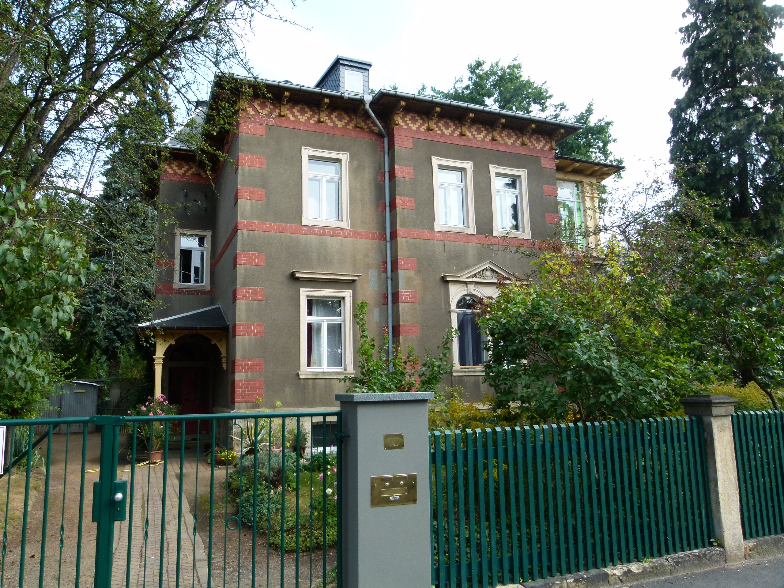 Denkmalgeschütztes Haus, Heinrich-Heine-Straße 10, Radebeul, Sachsen